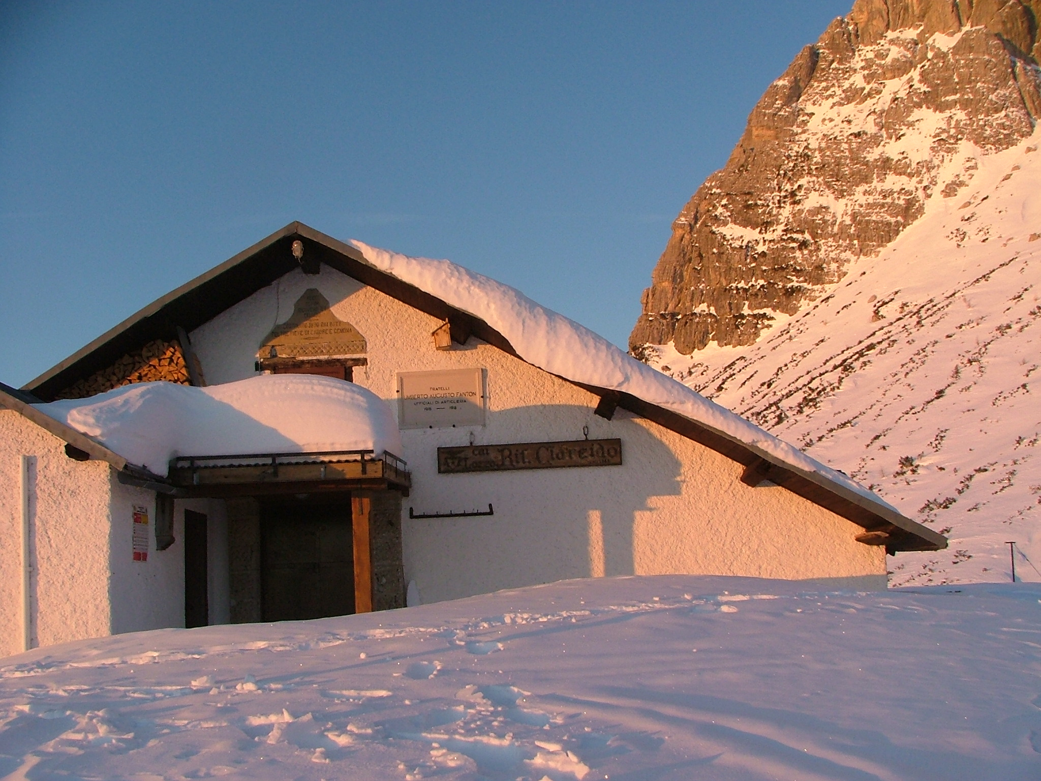 Rif. Ciareido, Marmarole, Lozzo di Cadore, Dolomiti, Belluno, Italy